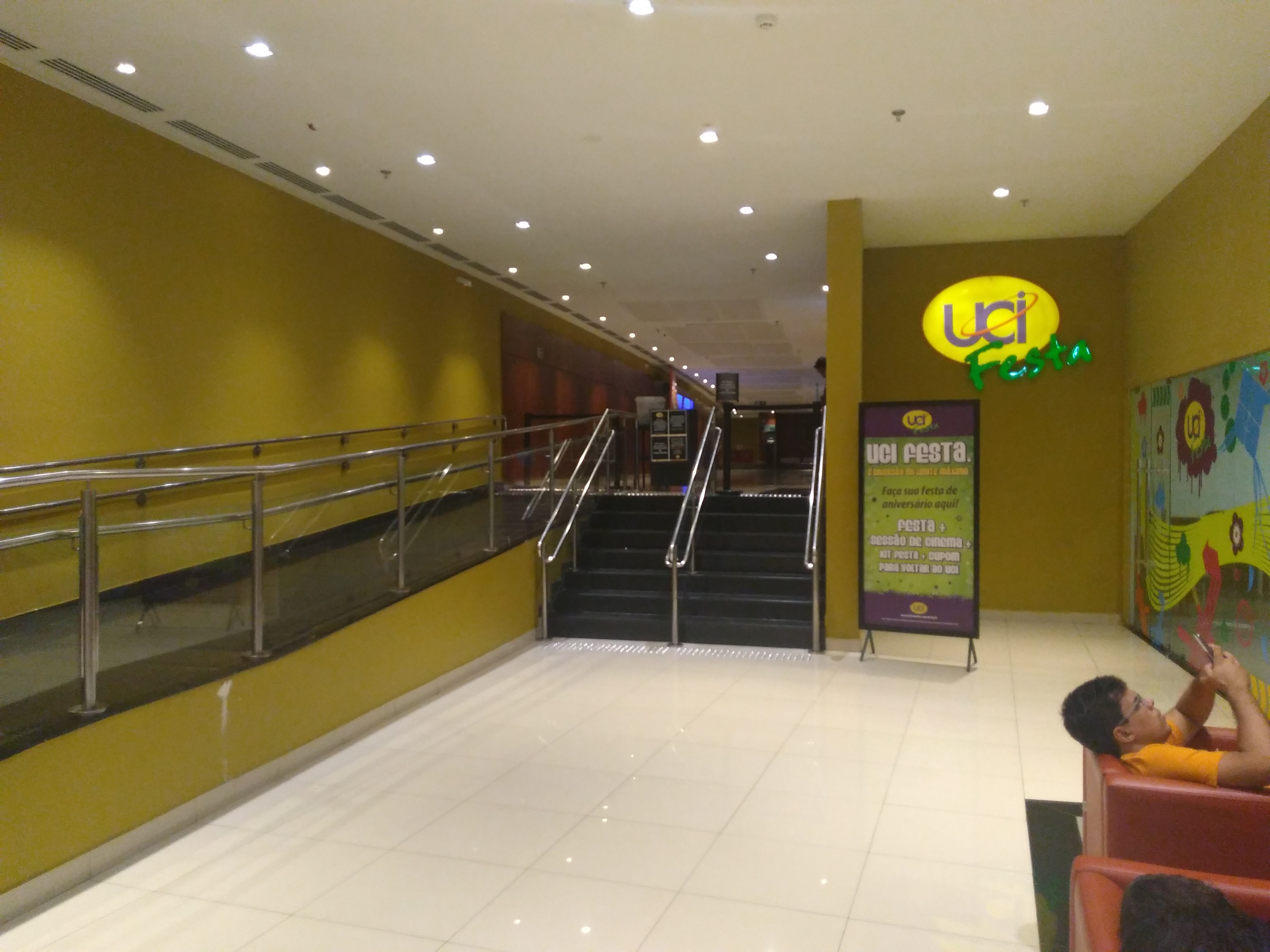 Cooredor de acesso às salas do cinema UCI Shopping Bosque Grão Pará, de Belém, Pará